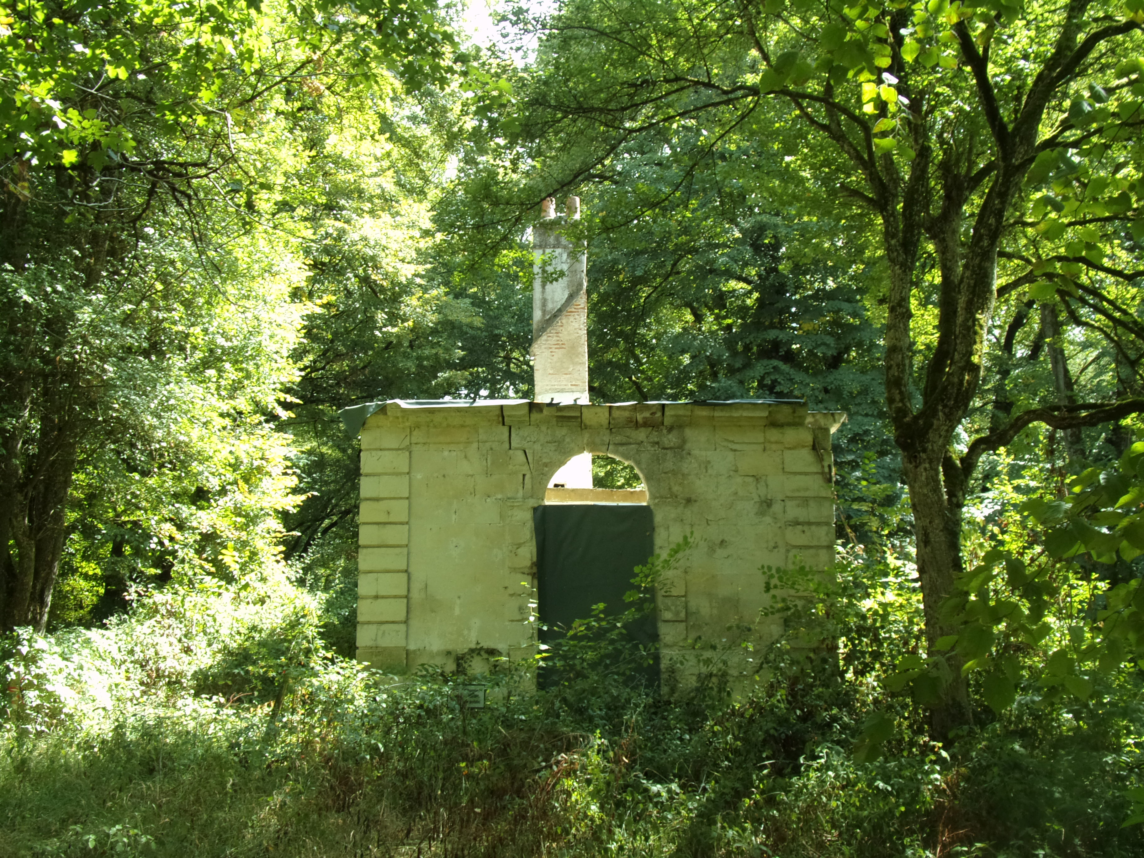 Pavillon ruiné de la Mauclergerie